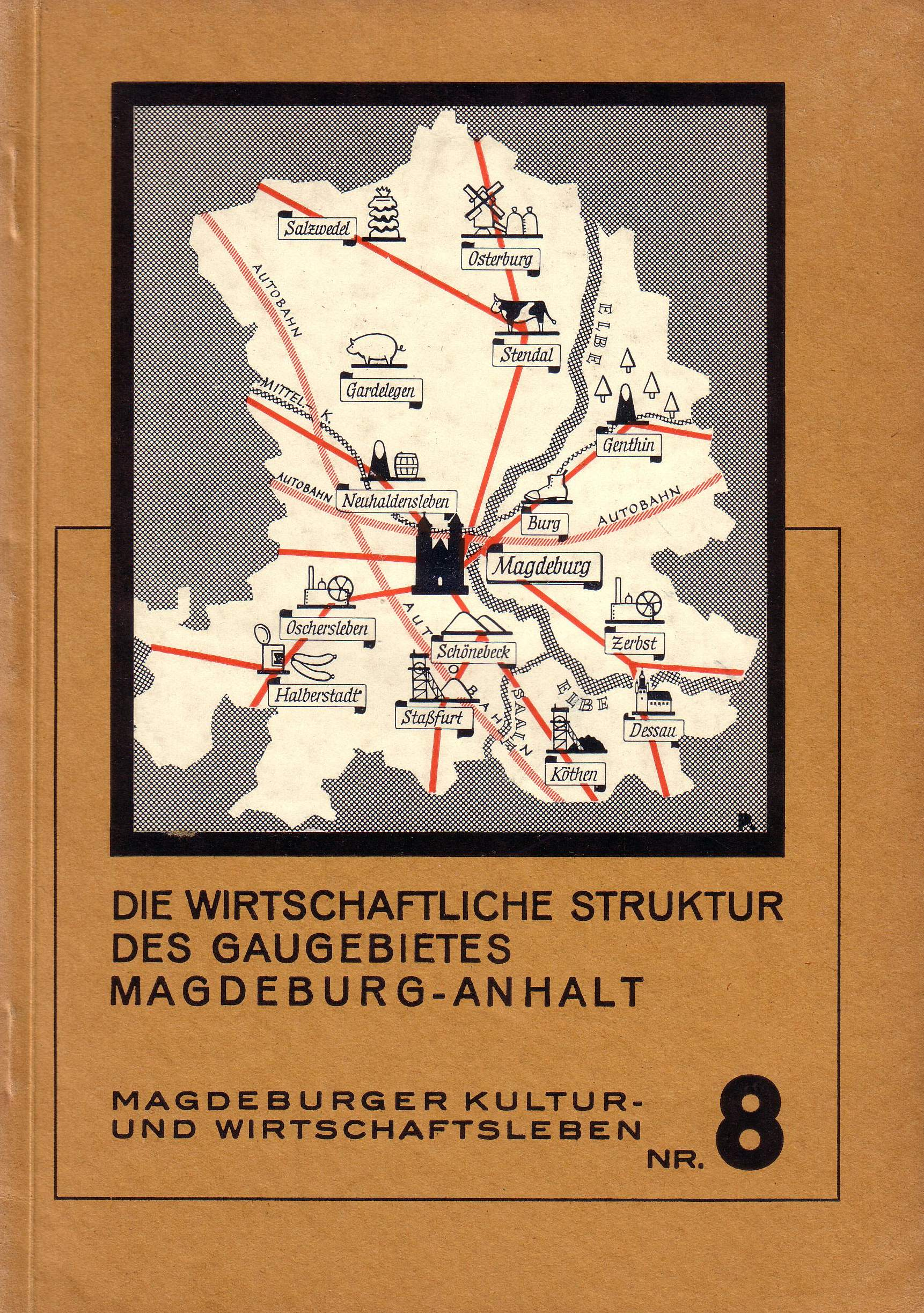 Die Wirtschaftliche struktur des Gaugebietes Magdeburg-Anhalt Martin Nathusius, Veröffentlichung